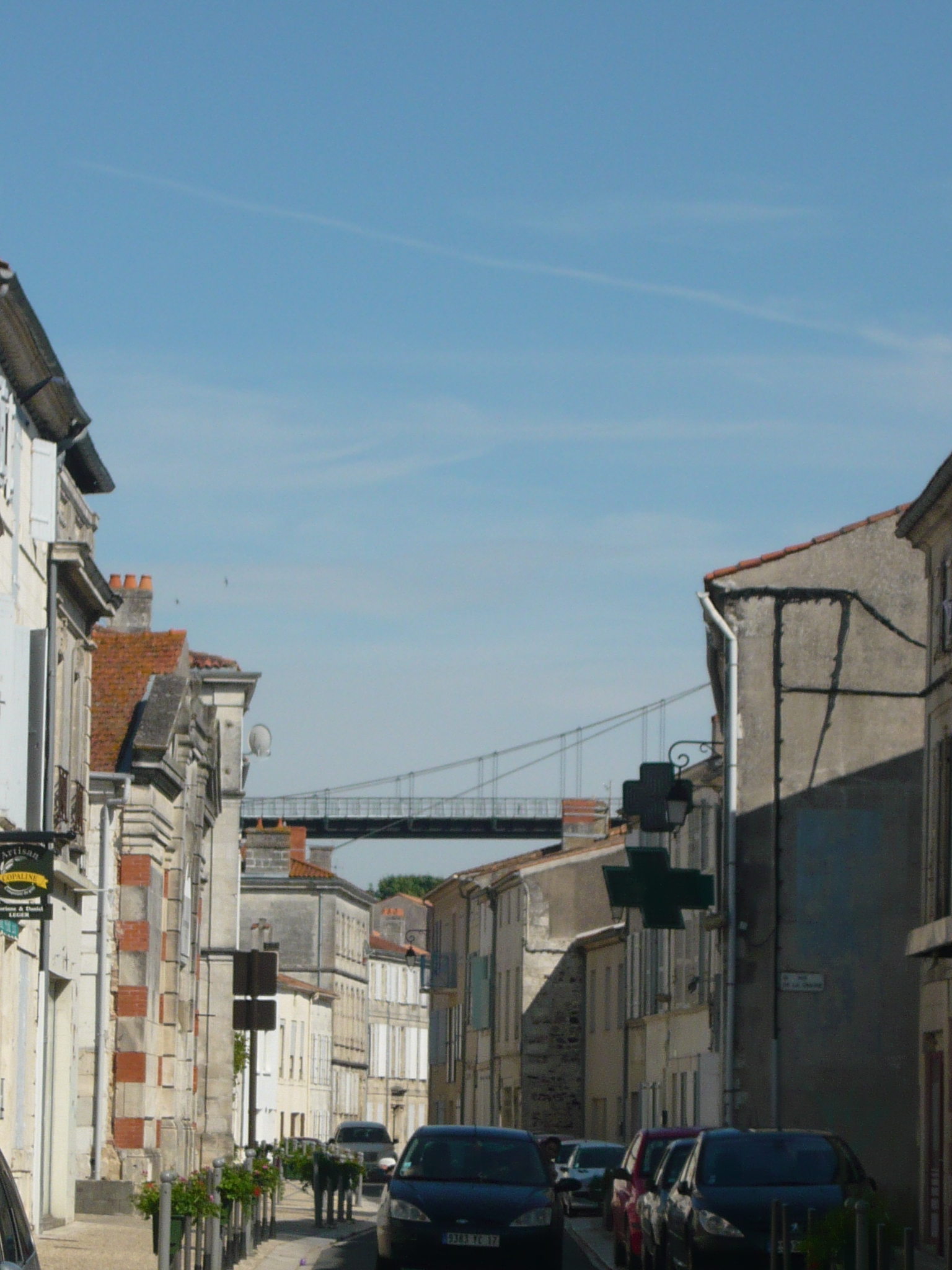 Vue sur le pont depuis une rue du centre-ville de Tonnay-Charente (17).